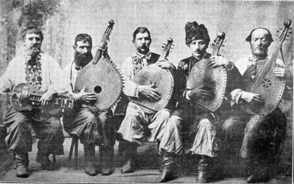 bandura ensemble performing in Okhtyrka 1911